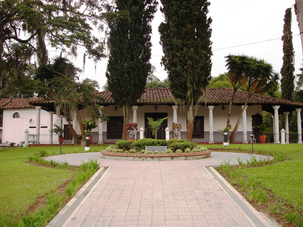 Casa de Convenciones Ditaires, en el municipio de Itagüí , Antioquia, Colombia. Ésta casa perteneció originalmente a Diego Echavarría Misas, actualmente es un centro de convenciones.